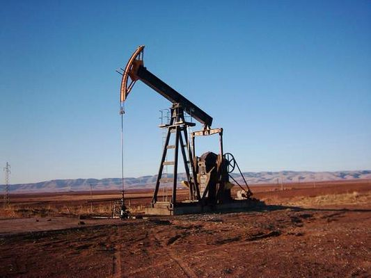 حقل نفط رميلان